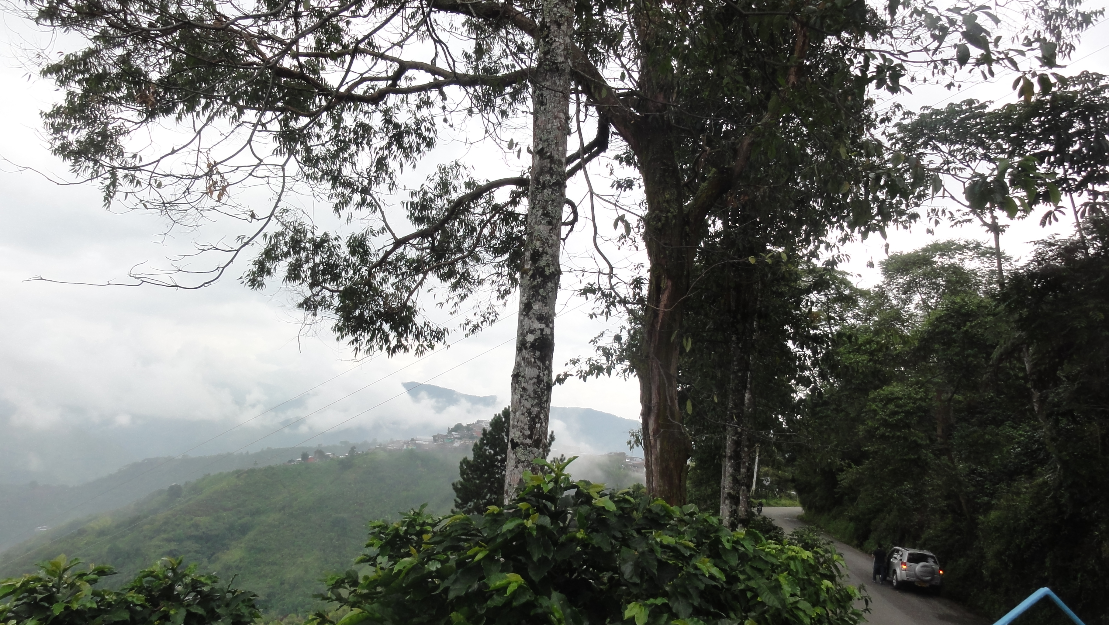 Vía Ansermanuevo a El Águila, gruta de la Virgen de la Inmaculada Concepción, aproximadamente a 700 metros al suroeste del parque principal de El Águila: zona cafetera. El Águila, Valle del Cauca, Colombia.